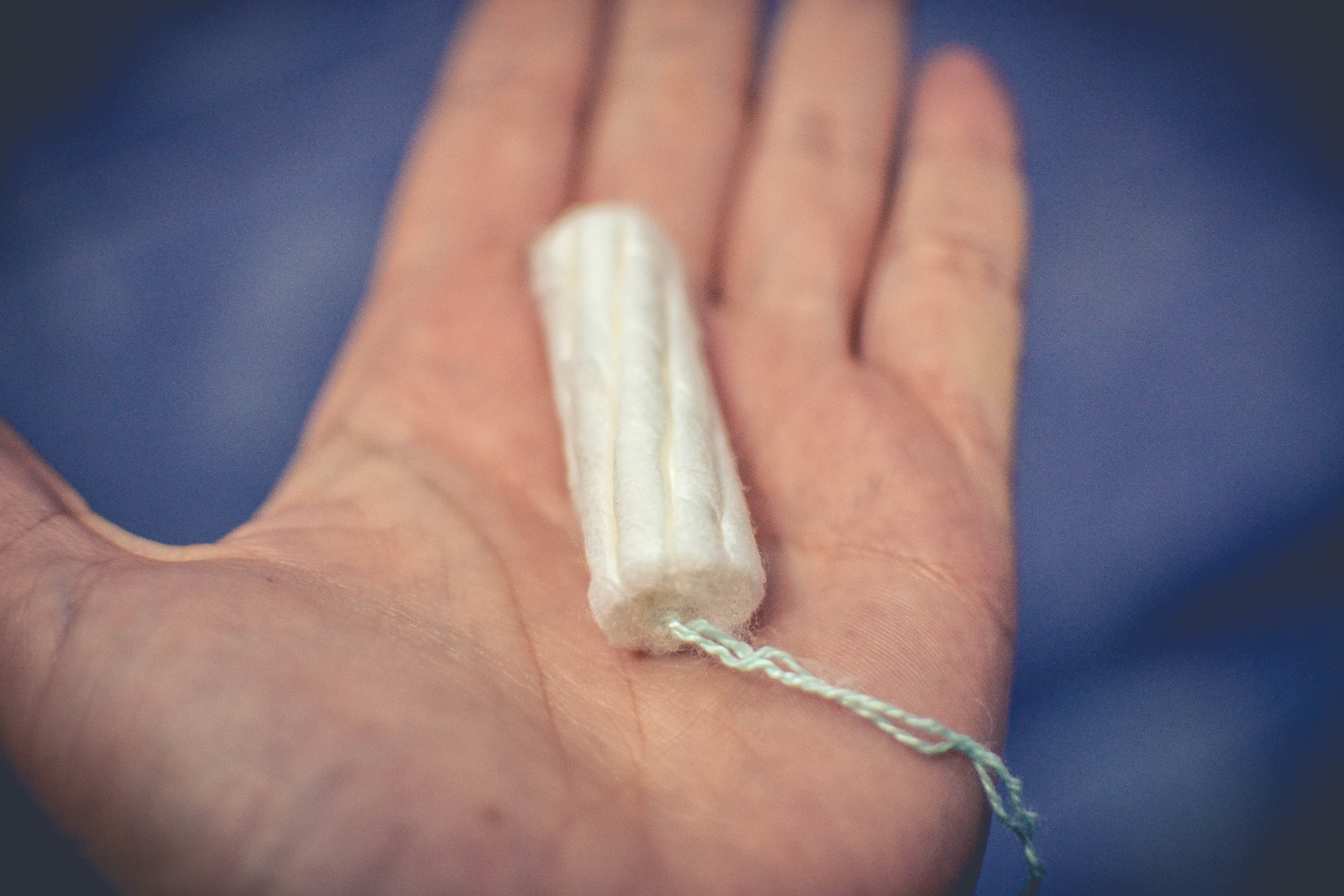 Gestion menstrual tampon toallitas menstruación periodicas menstruación menstruar es político